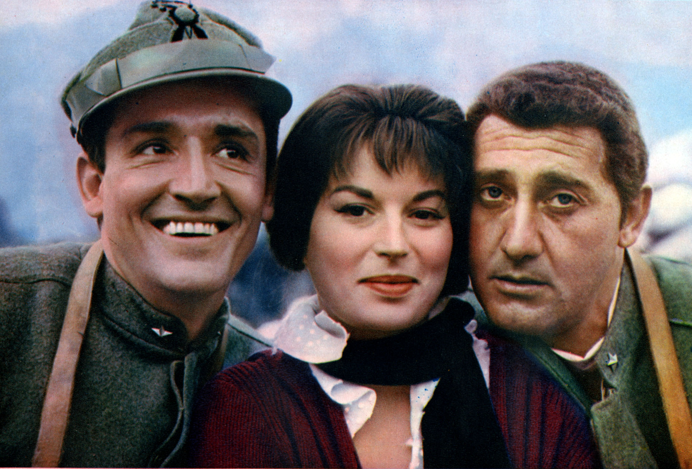 foto sul set La grande guerra con Gassman, Mangano e Sordi